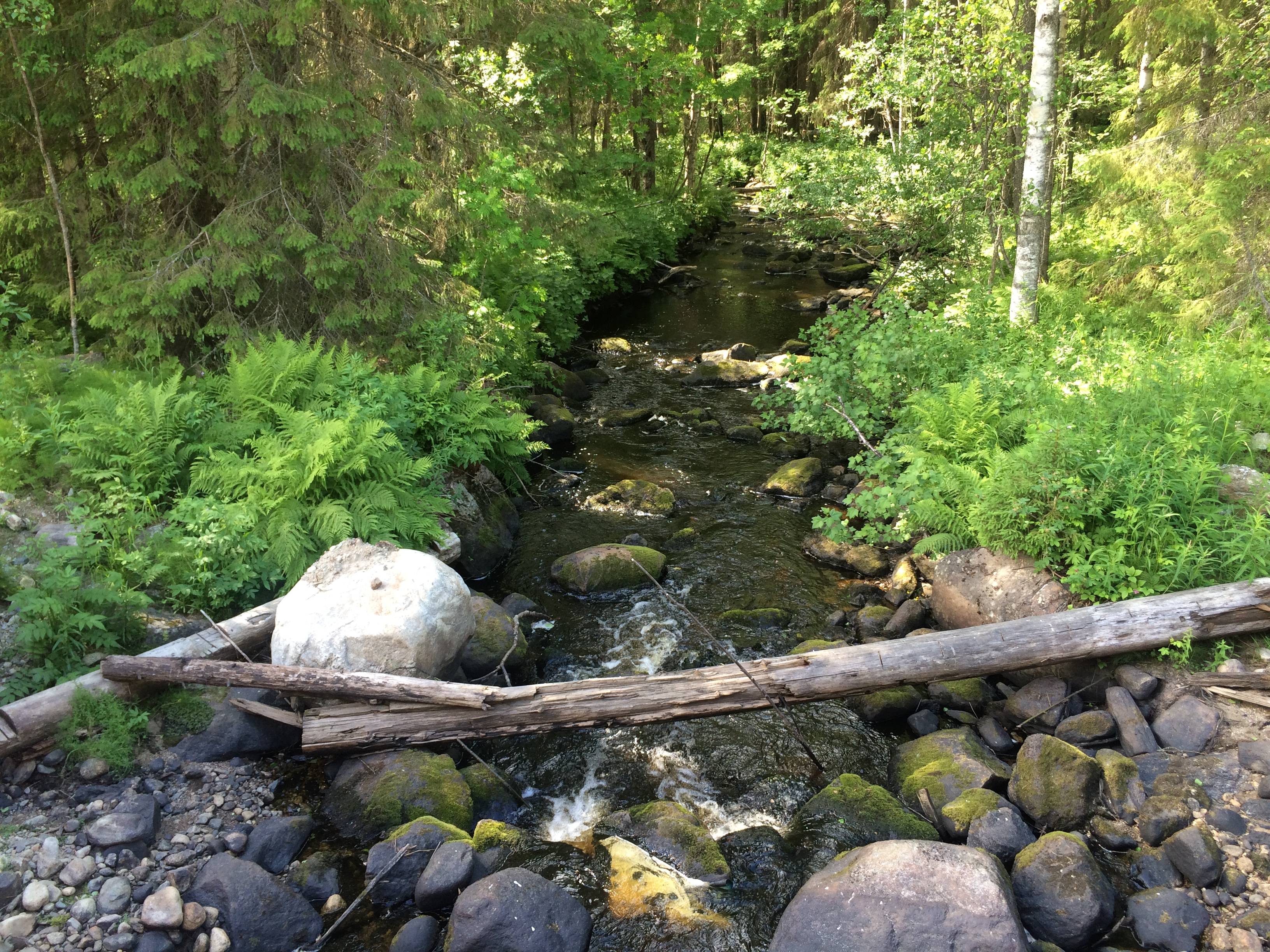 Саморека (река)